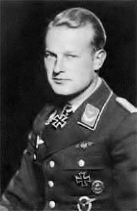 Mariscal de Campo Ernst Buffa